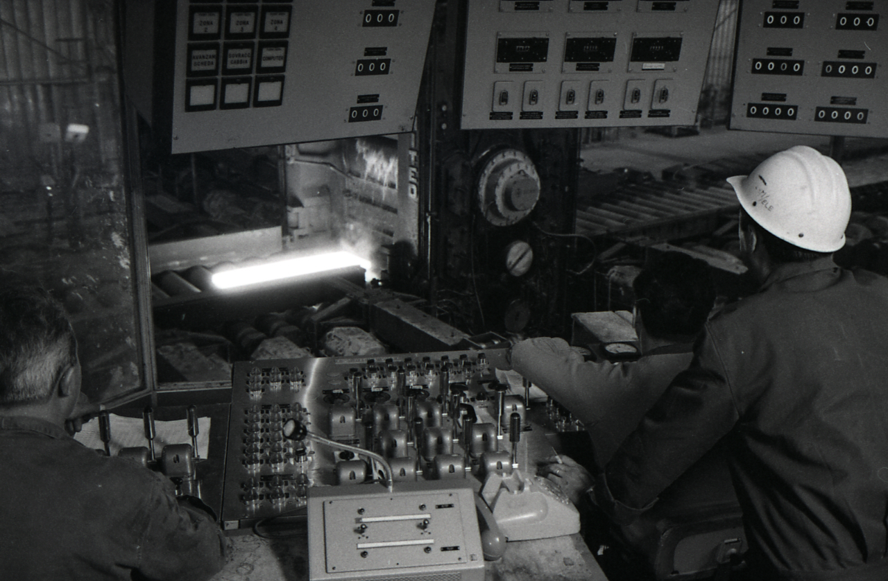 Servizio fotografico : Taranto, 1964 / Paolo Monti. - Strisce: 7, Fotogrammi complessivi: 37 : Negativo b/n, gelatina bromuro d'argento/ pellicola ; 35 mm. - ((I fotogrammi hanno una doppia numerazione. - Sul portanegativi: Leica Tri- X. - Sul dorso del portanegativi Monti specifica: "Laminatoio. Lamiere pesanti per tubi". - Fonte: Agenda di Paolo Monti: Foto Leica 2 / 111 - 285 (1934-1965), presso Archivio Paolo Monti